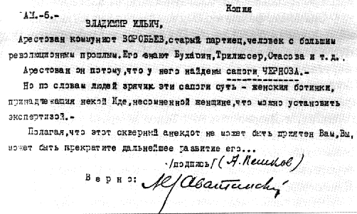 Записка М. Горького В. Ленину. Текст записки: ВЛАДИМИР ИЛЬИЧ, Арестован коммунист ВОРОБЬЕВ, старый партиец, человек с большим революционным прошлым. Его знают Бухарин, Трилиссер, Стасова и т. д. Арестован он потому, что у него найдены сапоги ЧЕPНОВА. Но, по словам людей зрячих, эти сапоги суть — женские ботинки, принадлежащие некой Иде, несомненной женщине, что можно установить экспертизой. Полагая, что этот скверный анекдот не может быть приятен Вам, Вы, может быть, прекратите дальнейшее развитие его… /подпись/ (А. Пешков)